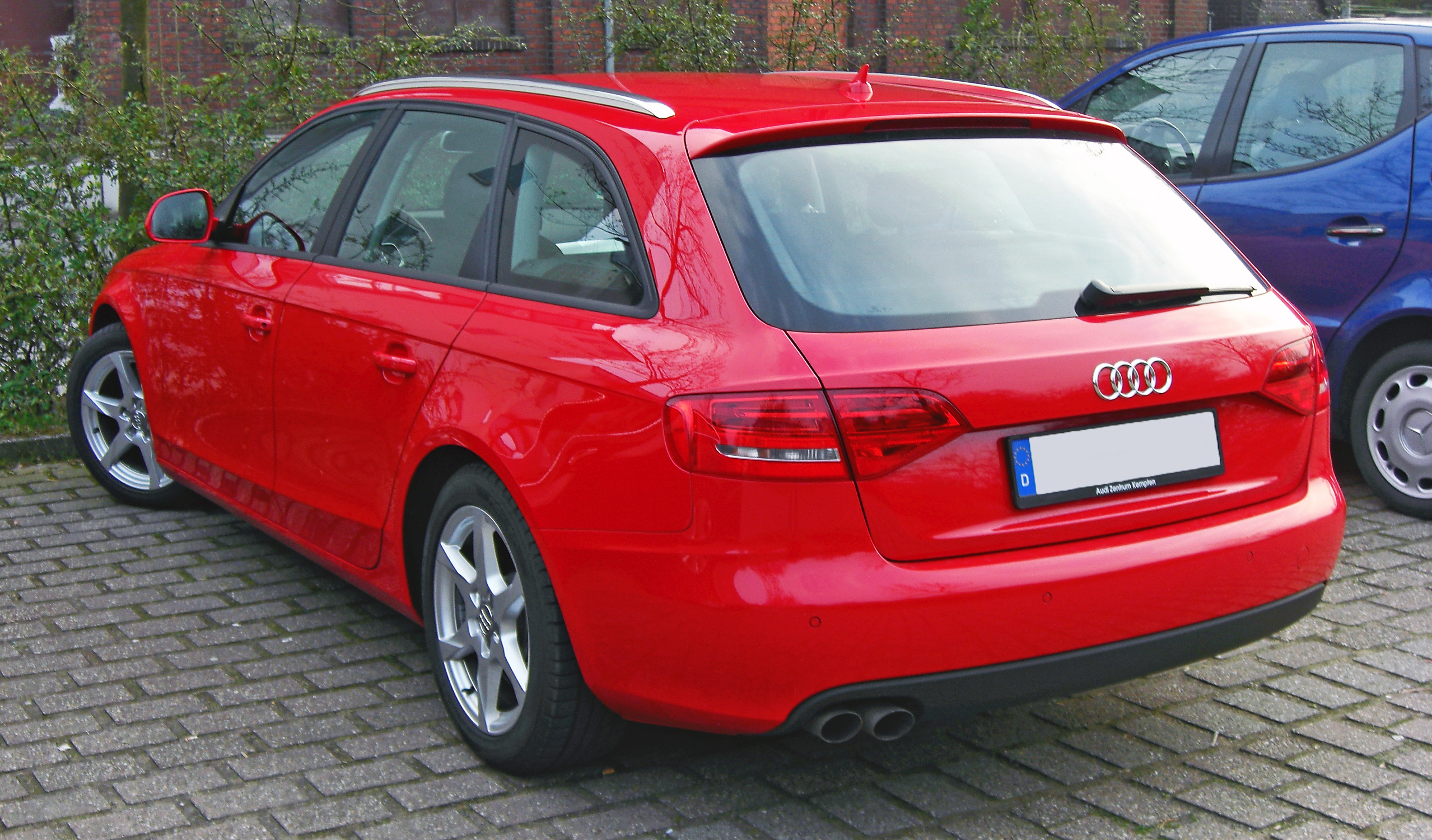 Audi A4 Avant